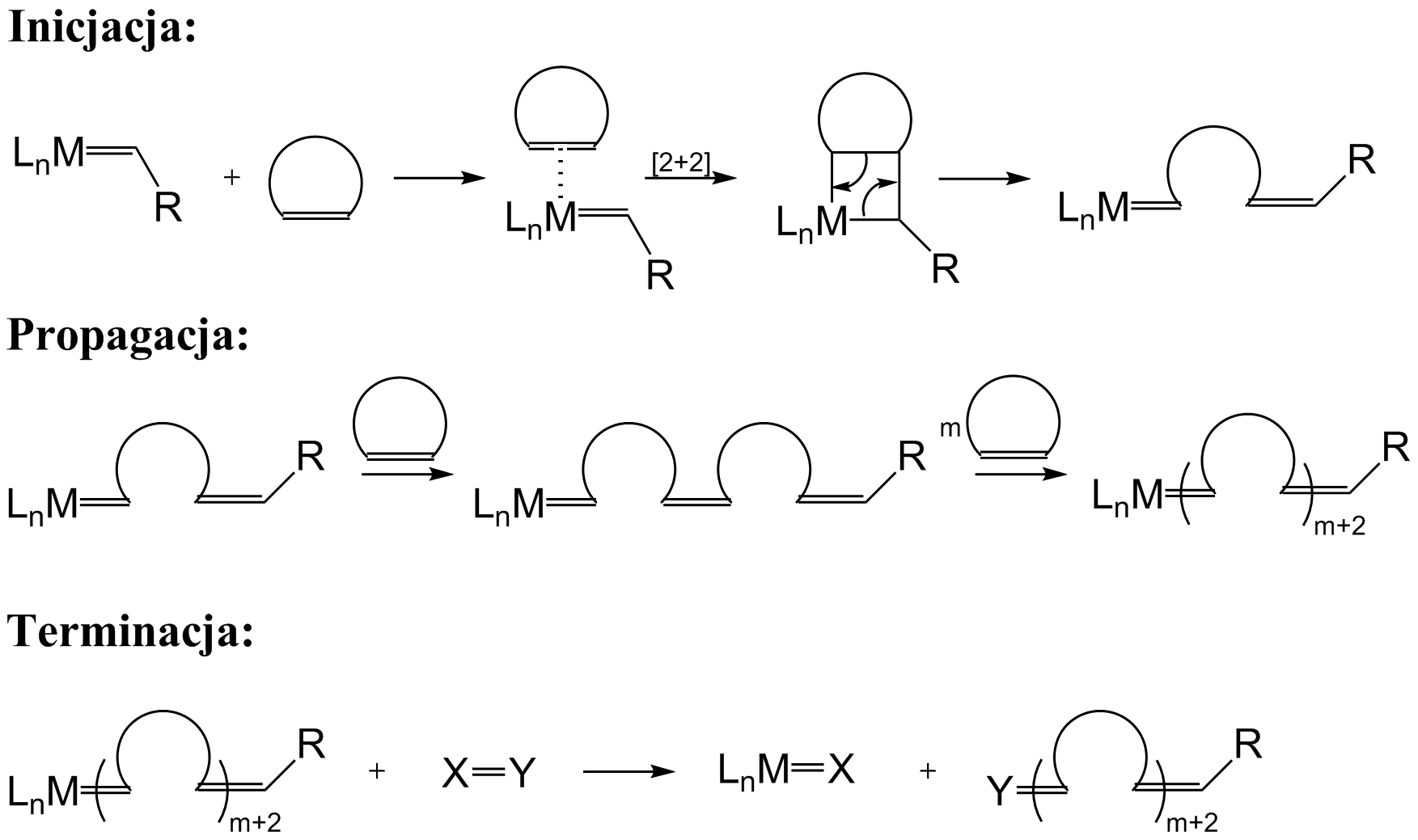 Mechanizm reakcji ROMP (RIng Opening Metathesis Polymerization, Metatetyczna polimeryzacja cykloolefin z otwarciem pierścienia)